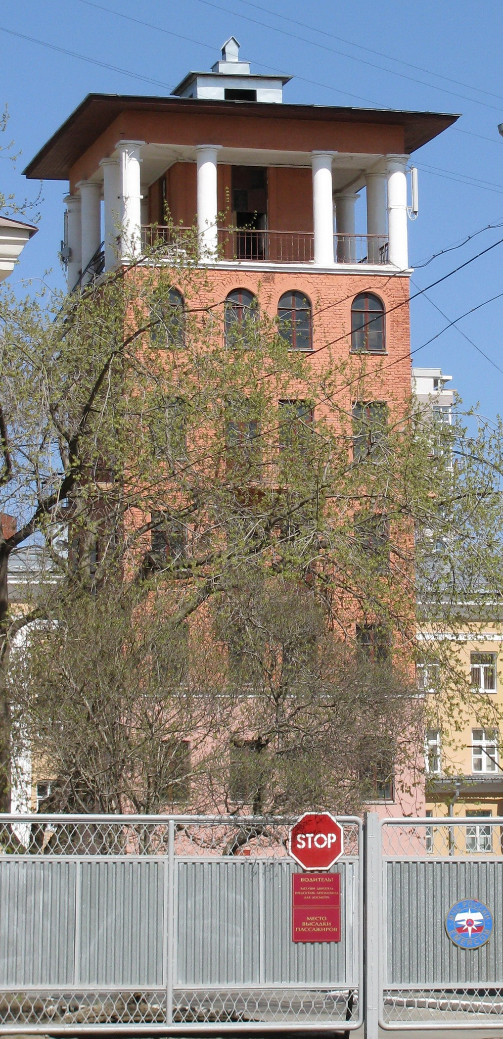 Пожарная башня УрИГПС